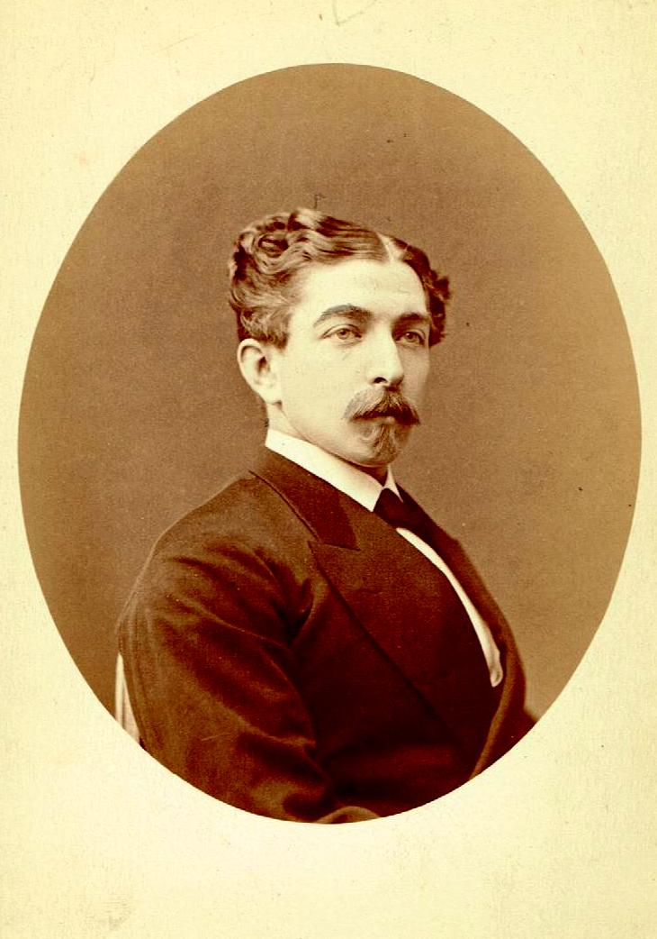 Scan eines alten Familienfotos von Rudolf Lochner dem Unternehmer